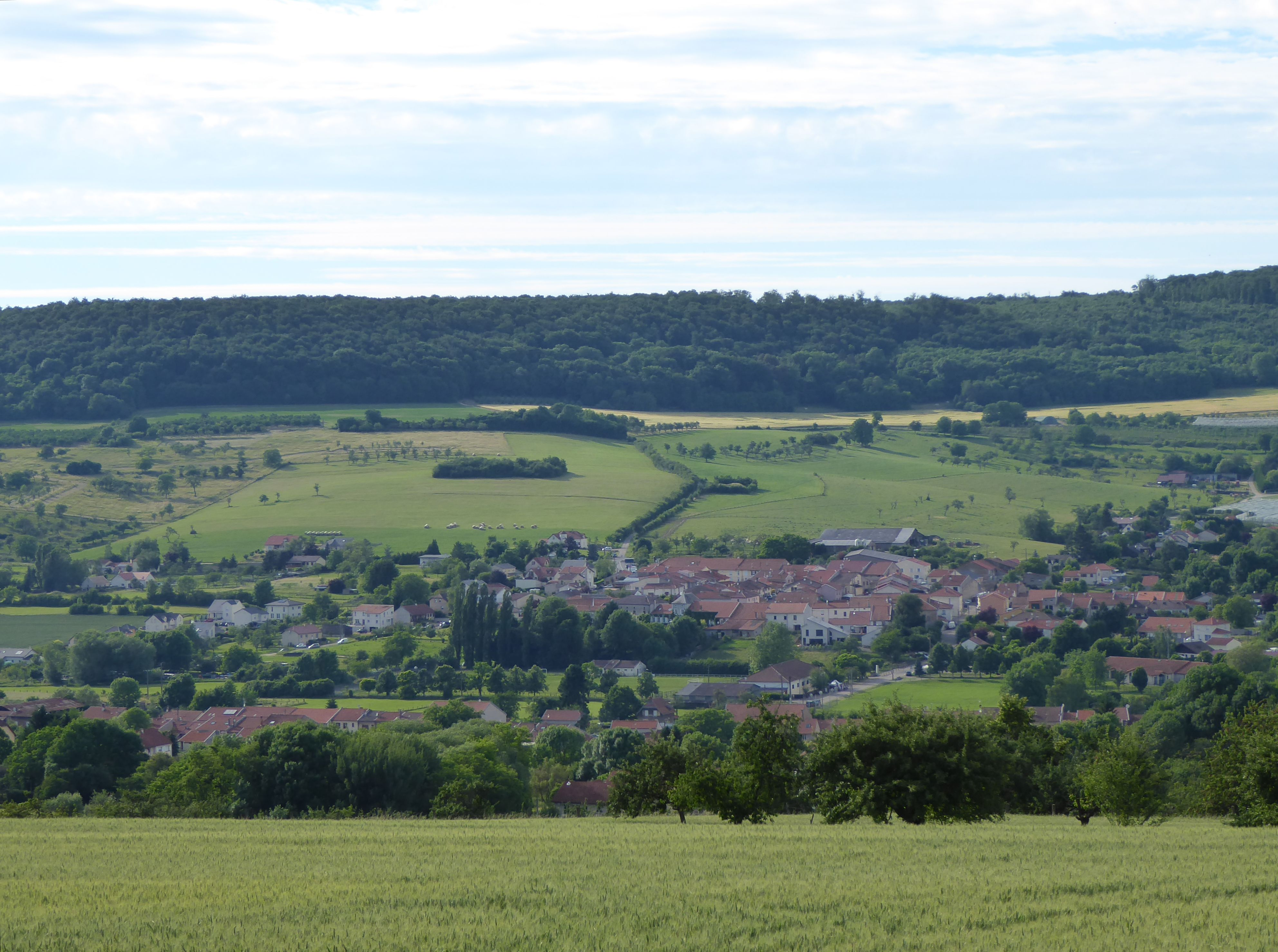 Faulx en Meurthe-et-Moselle (France), vue des hauteurs au sud.